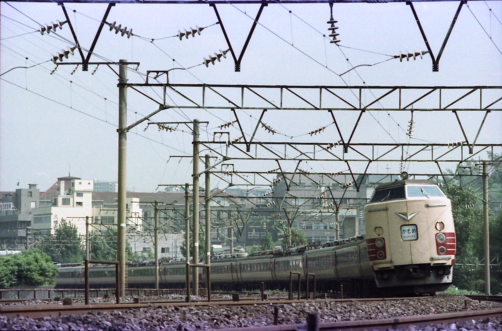 特急「かもめ」1号 博多駅へ回送 みどりと併結 鹿児島本線 枝光駅-八幡駅（旧線） 枝光カーブ